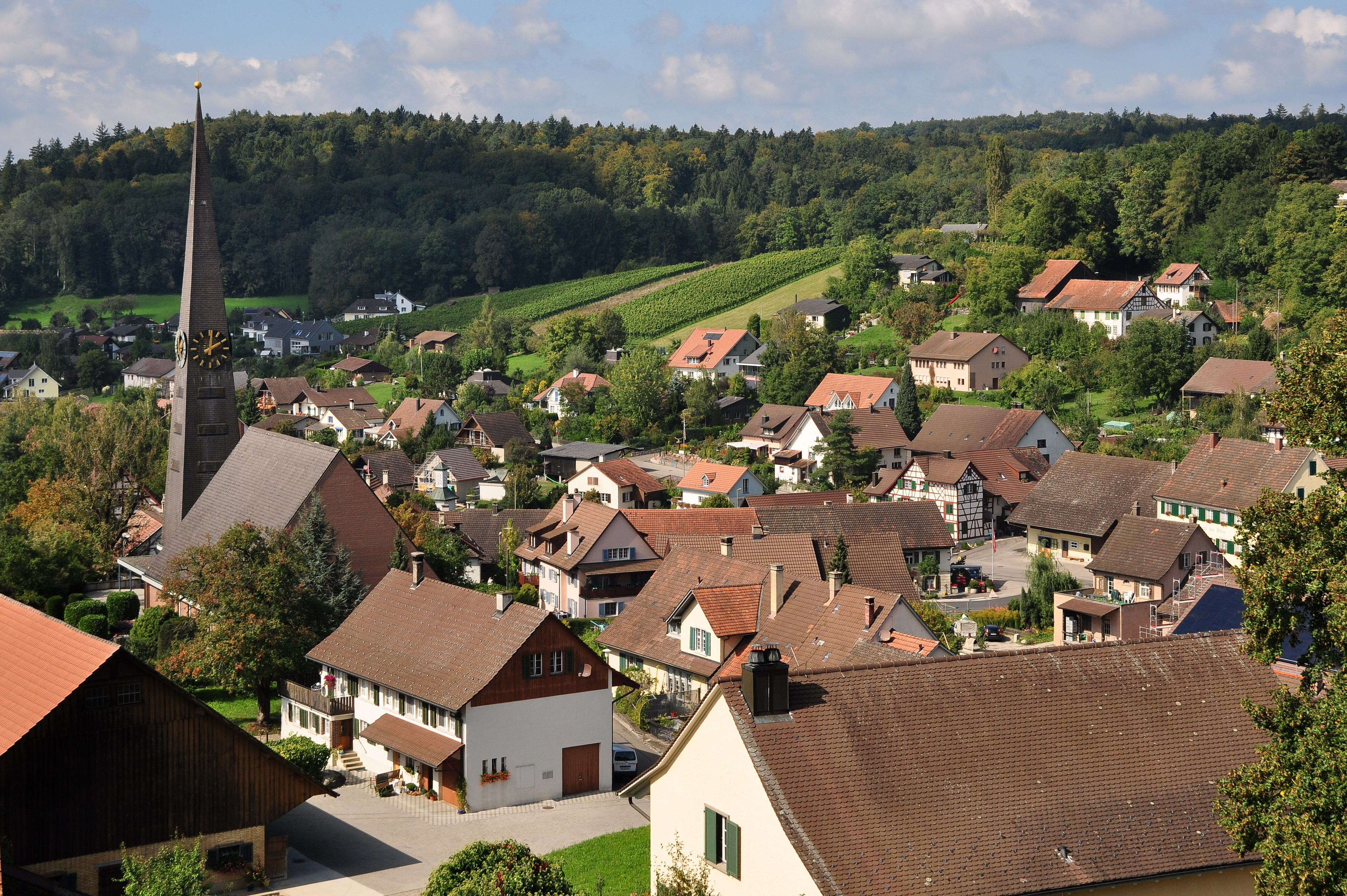 Trüllikon (Switzerland)